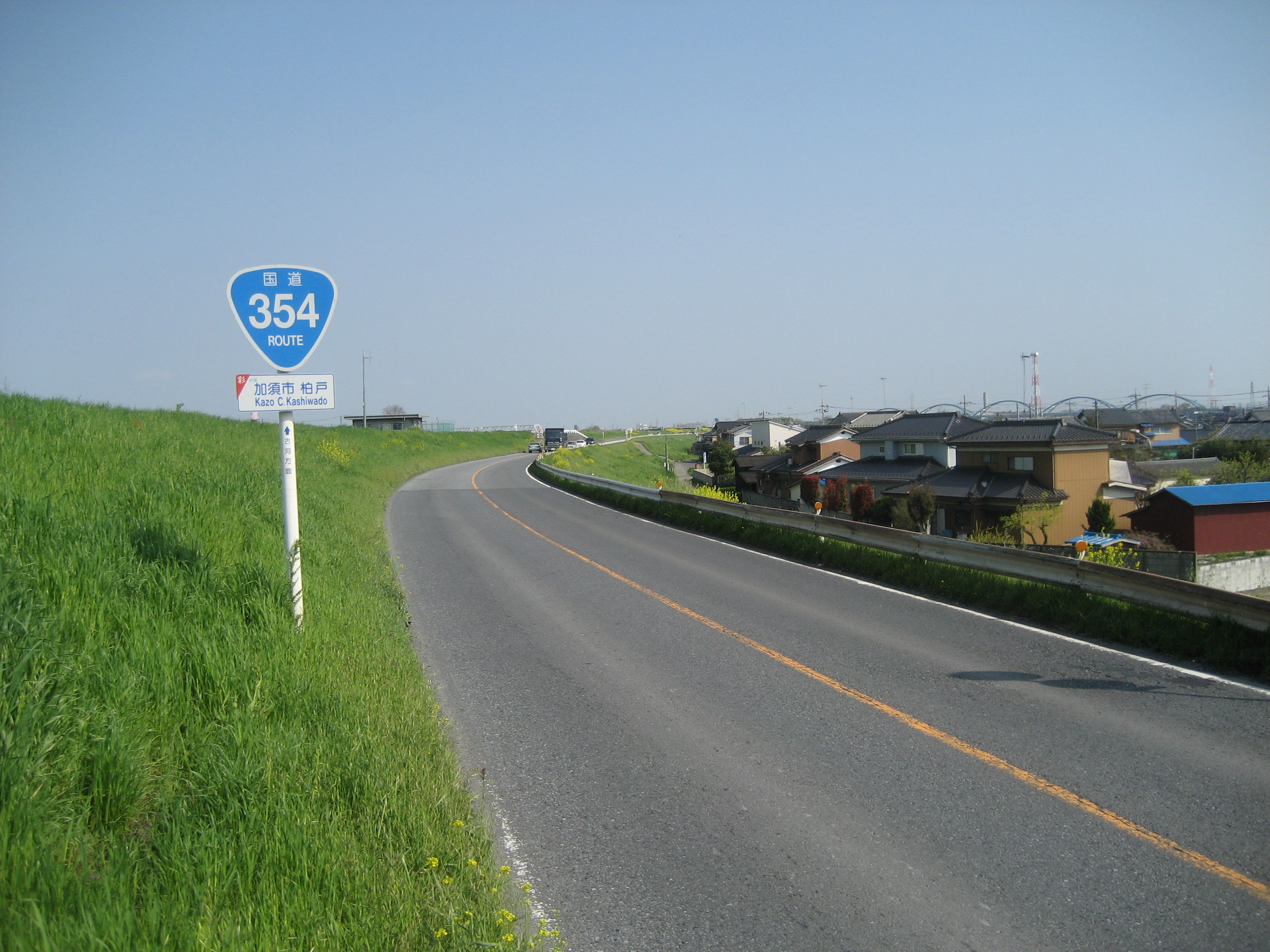 国道354号線埼玉県加須市内